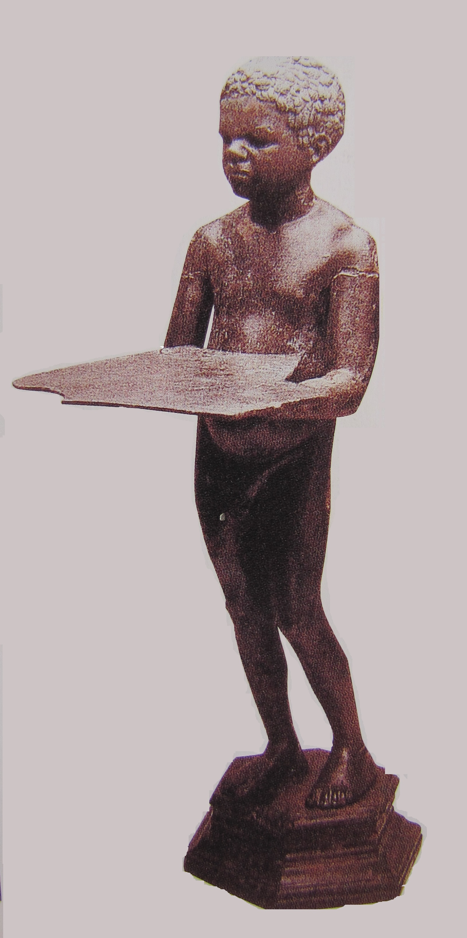 Dit is een beeldje uit de 1e eeuw na Christus. Het werd gevonden in de provincie Hispania. De lampadophores van Hispania bevindt zich nu in het nationaal museum van archeologie in Tarragona.